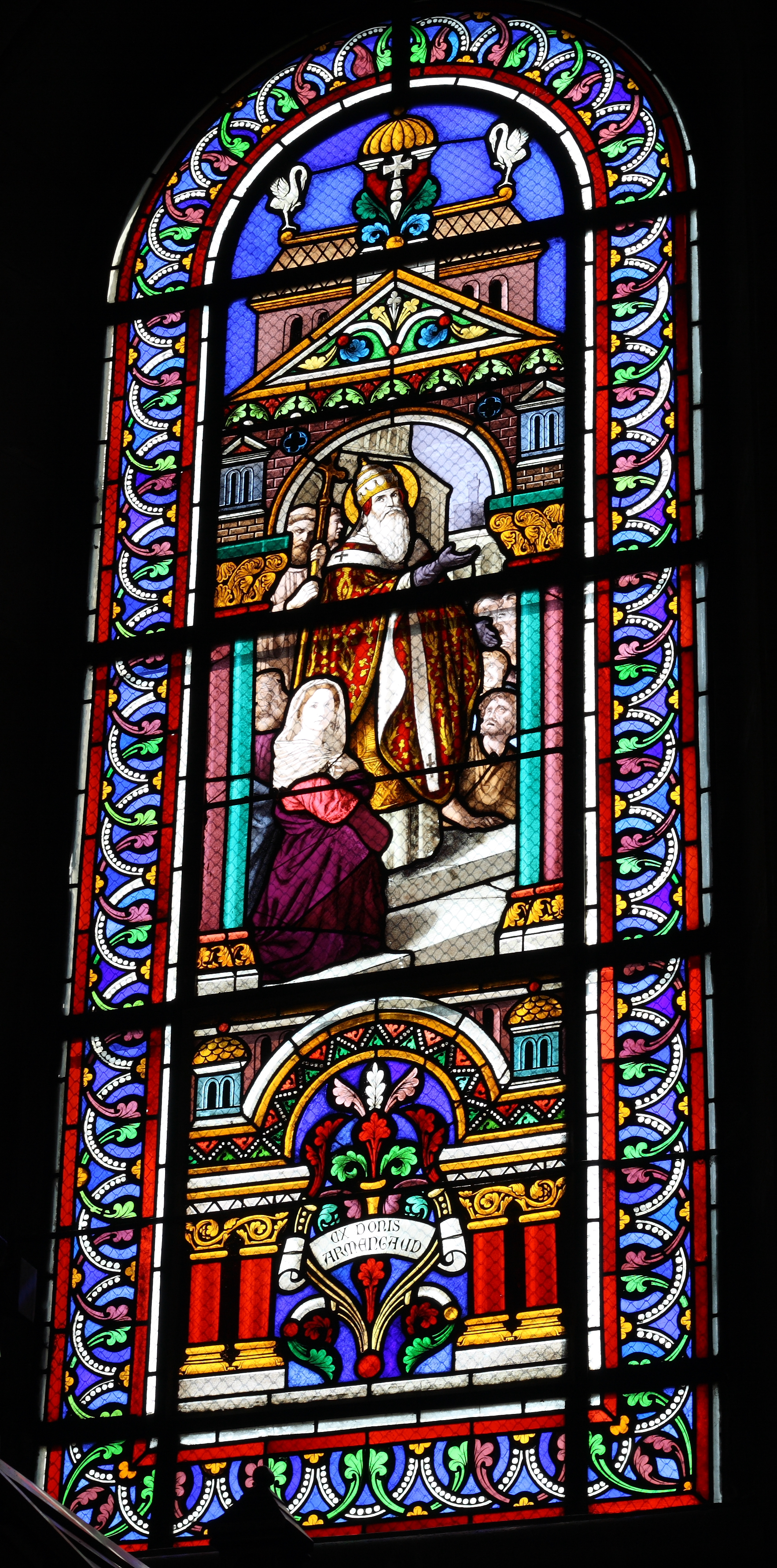 Bleiglasfenster in der katholischen Pfarrkirche Saint-Clodoald in Saint-Cloud, Darstellung: Papst Gregor VII., Hersteller: Achille und Eugène Oudinot (um 1866), Inschrift: "Ex donis Armengaud" (gestiftet von Armengaud/Jacques Armengaud damals Gemeinderat von Saint-Cloud)